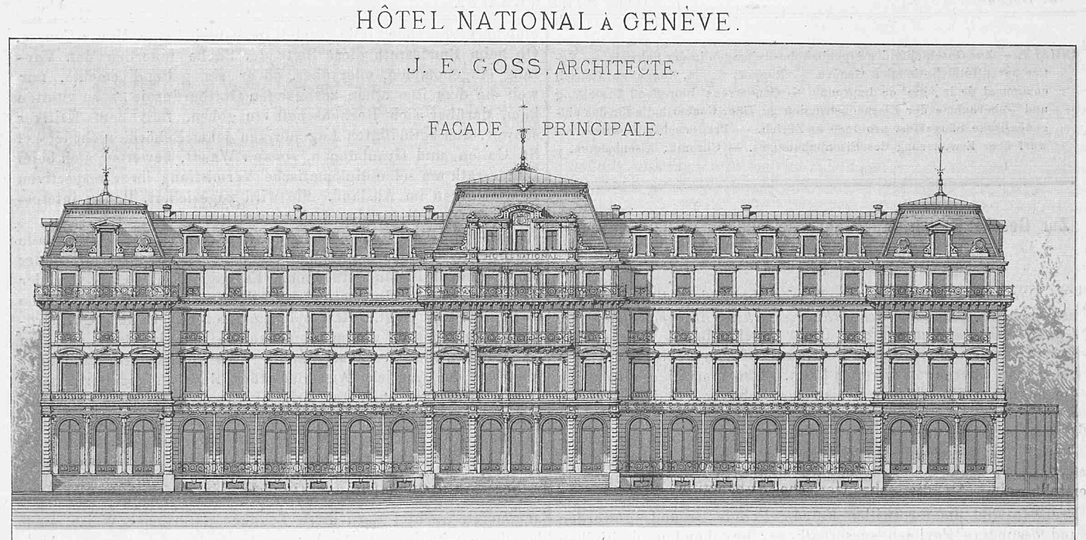 Hôtel National, Genf, erbaut 1875–76. Hauptfassade. Architekt: Jacques-Elysée Goss. Heute Palais Wilson, Sitz des UNHCR.